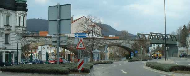 Viadukt der Talgangbahn in Albstadt-Ebingen